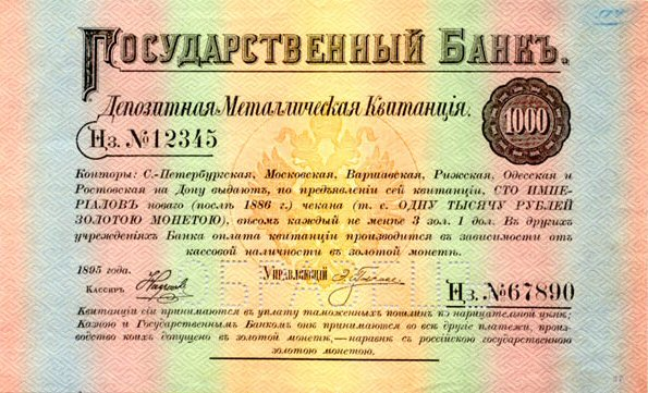 Депозитная металлическая квитанция Госбанка 1000 рублей 1895 года. Аверс.